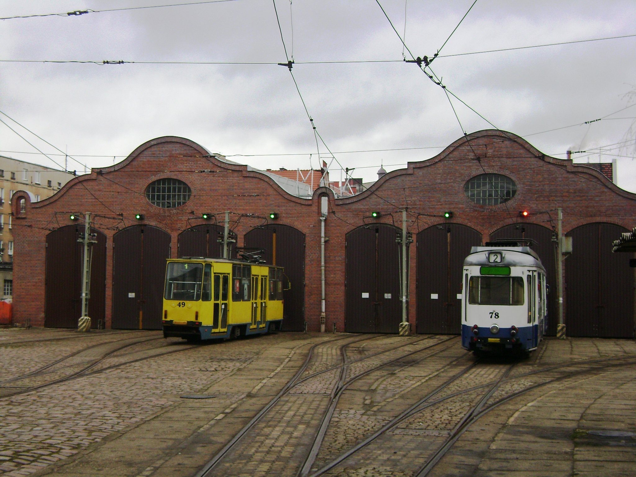 Zajezdnia tramwajowa w Grudziądzu.